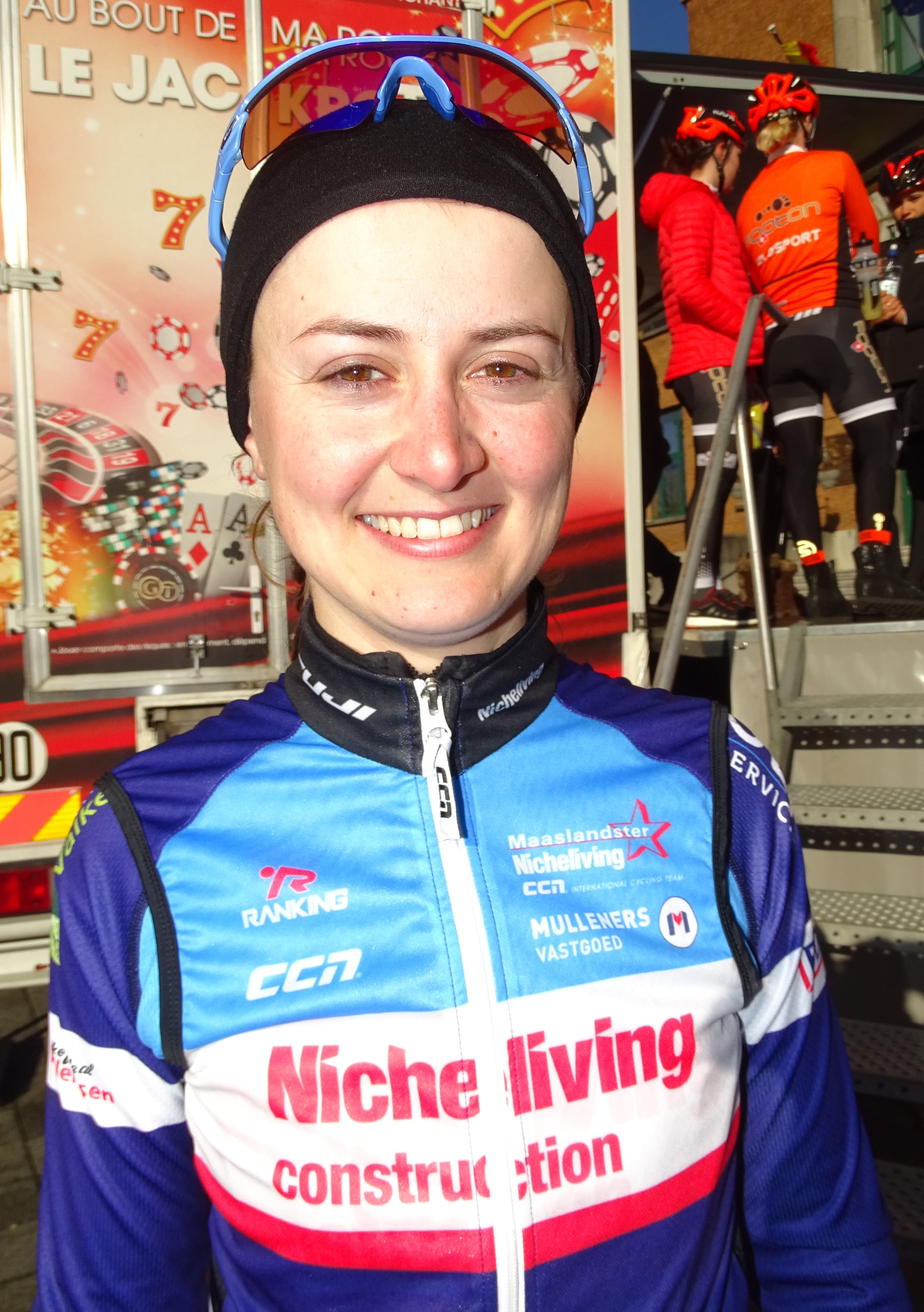 Reportage réalisé le mercredi 2 mars à l'occasion du départ du Samyn des Dames 2016 et du Samyn 2016 à Quaregnon, Belgique.